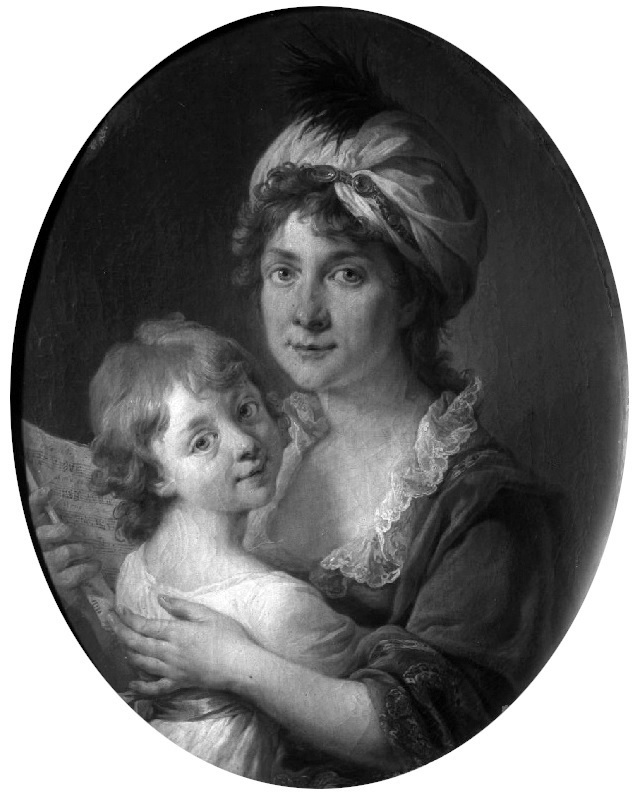 Беларуская (тарашкевіца): Партрэт Эвы Бжастоўскай (Eva Bžastoŭskaja) з роду Храптовічаў (Chraptovič)